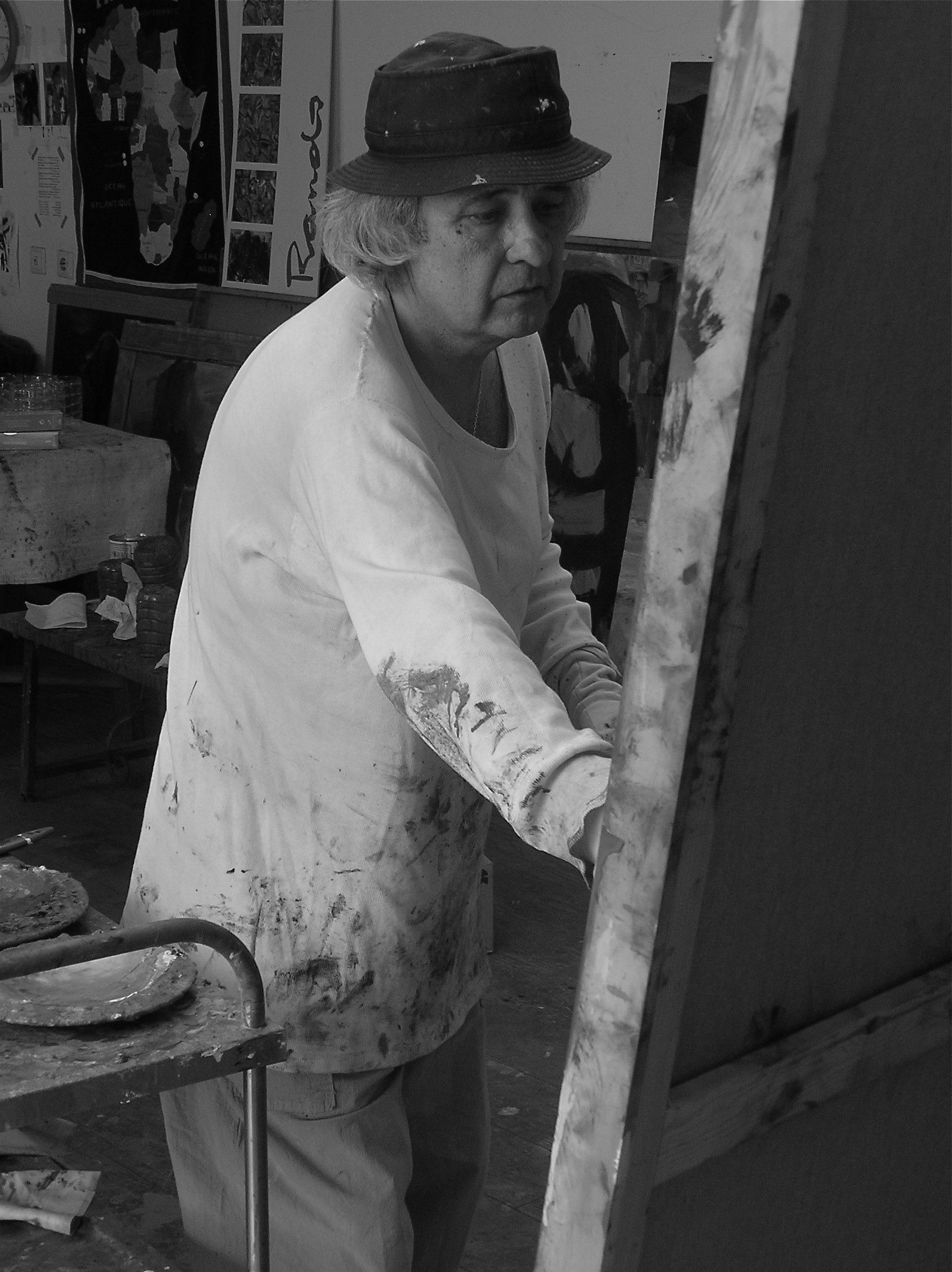 Imagen del artista Jorge Rando